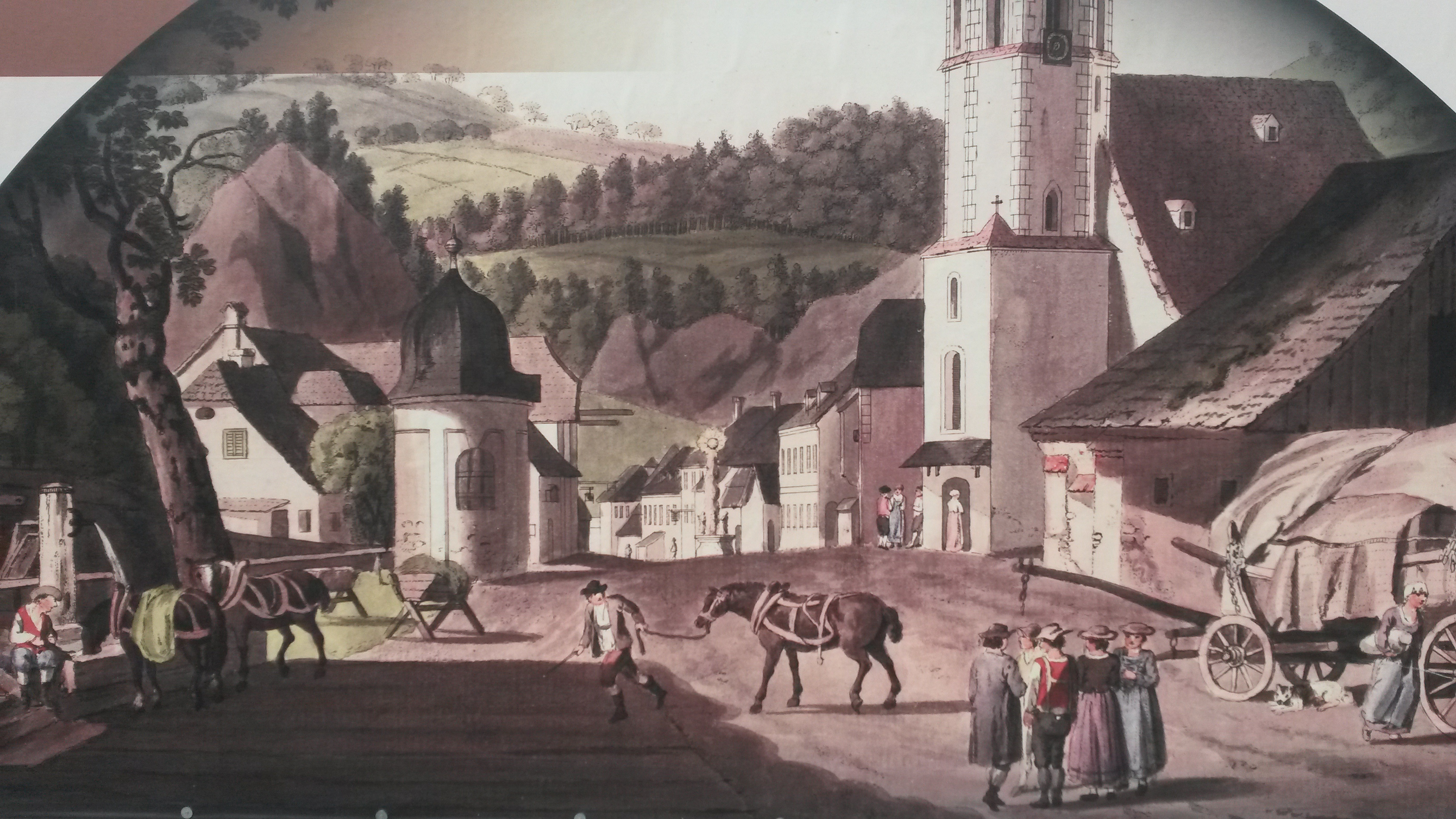 Straßenszene mit Fuhrknechten vom Anfang des 19. Jahrhundert in Schottwien, Österreich.